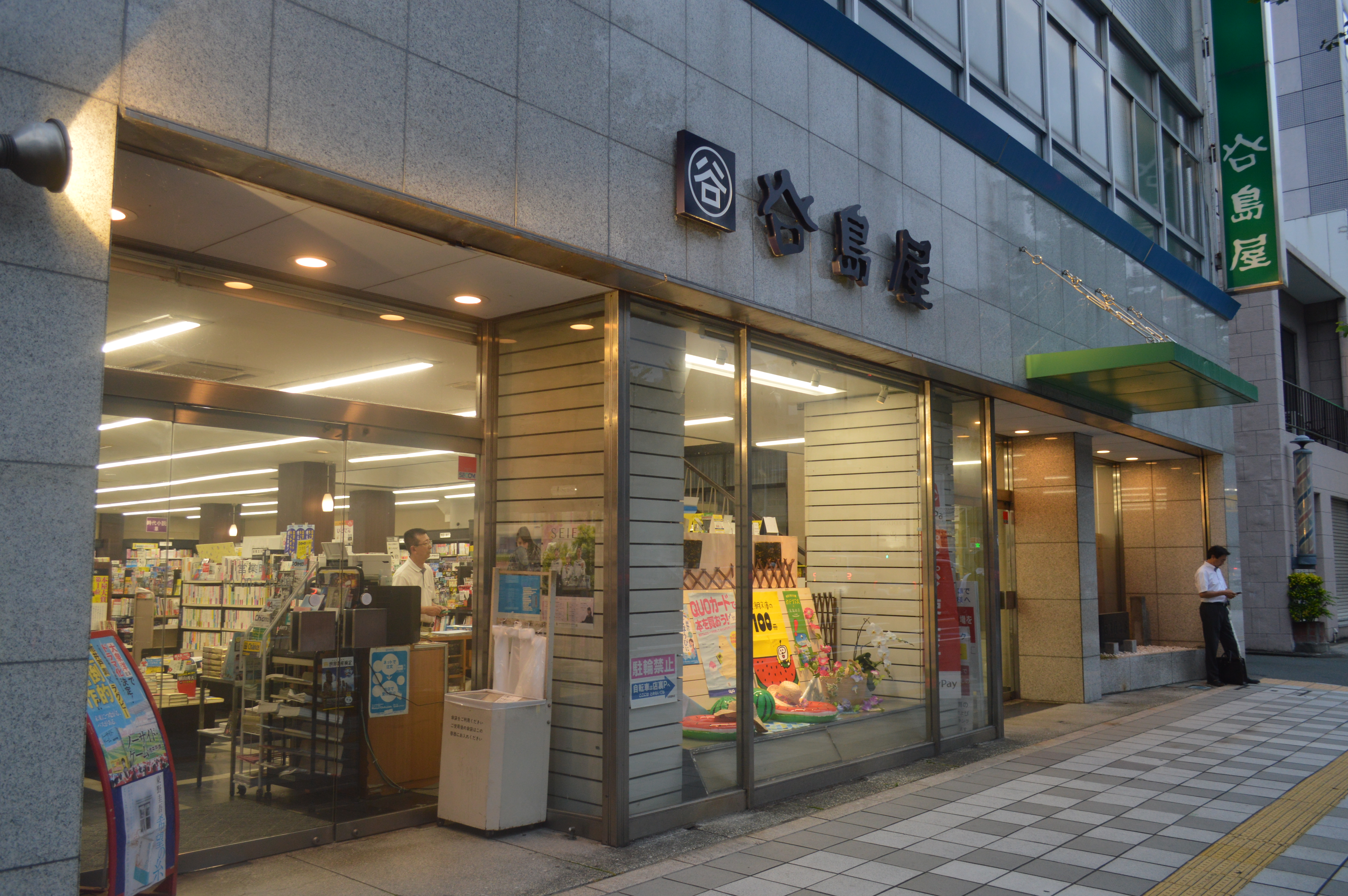 静岡県浜松市にある谷島屋書店連尺店。かつての浜松本店。